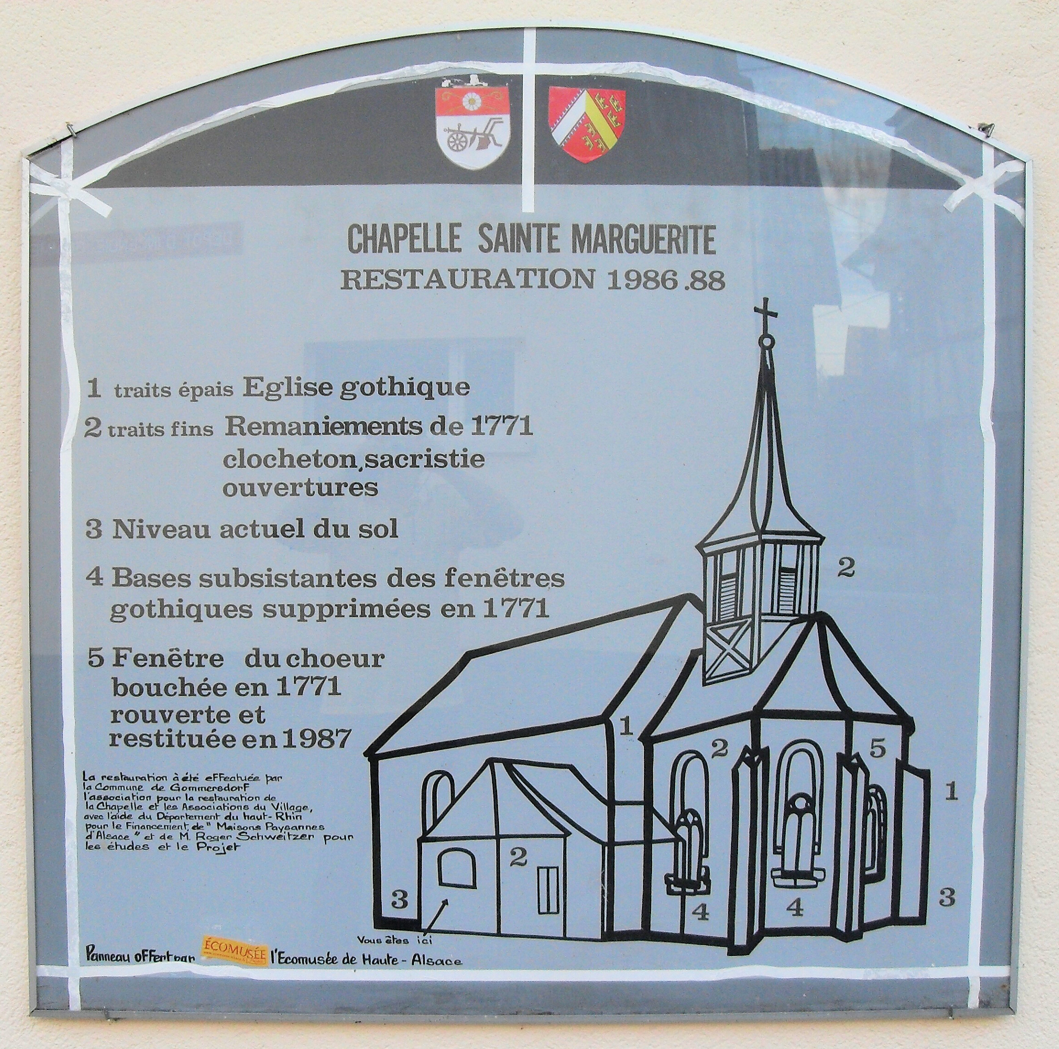 Panneau de la chapelle Sainte-Marguerite à Gommersdorf